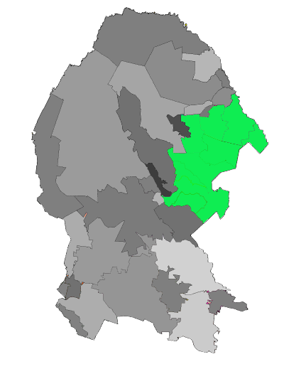 Distrito 3 Federal en Coahuila